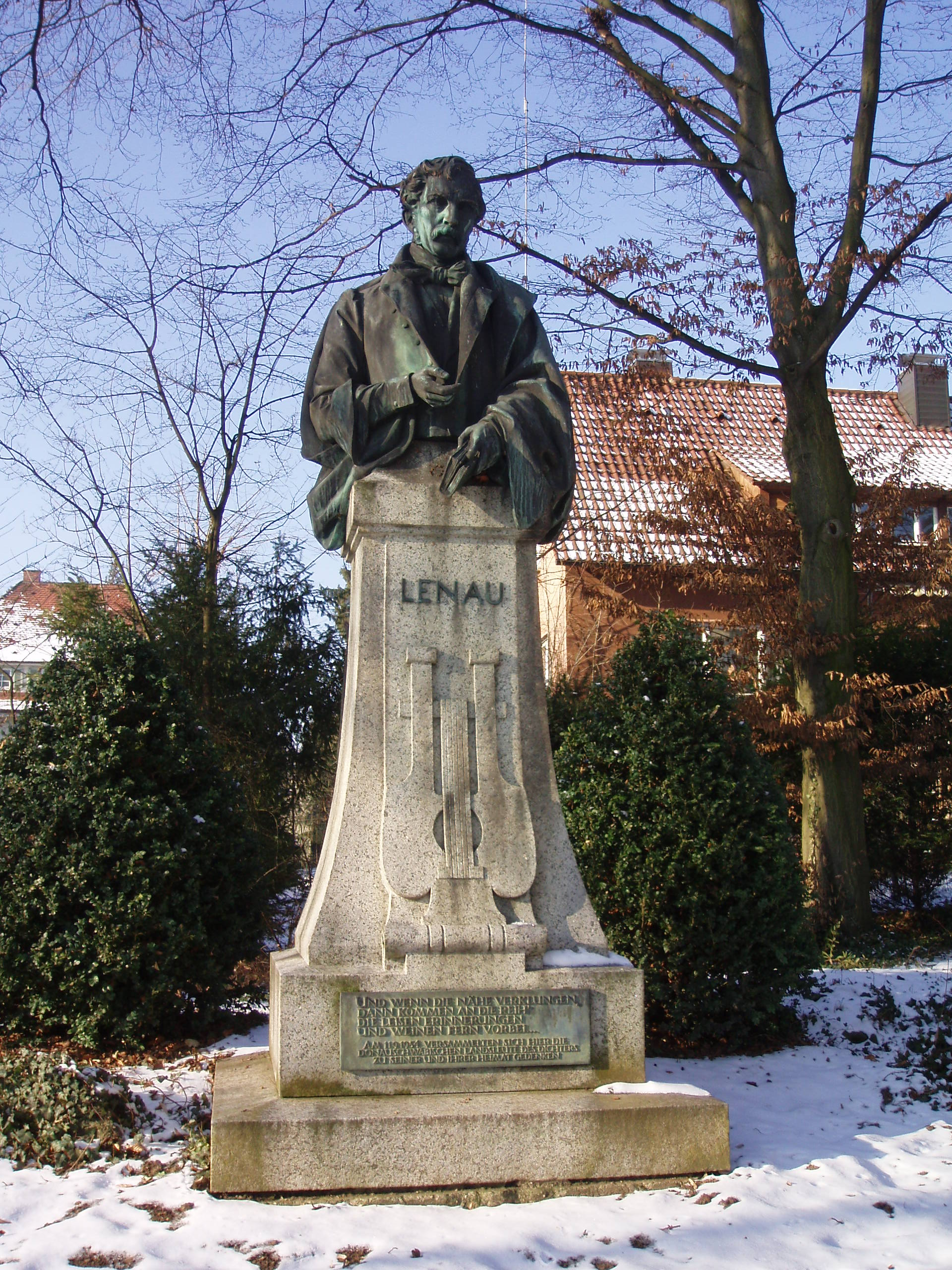 Emil Kiemlen, Lenaudenkmal in Esslingen am Neckar, 1903